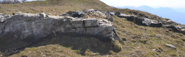 Monte Castelfraiano, nel comune di Castiglione Messer Marino, Abruzzo: i resti del castello.